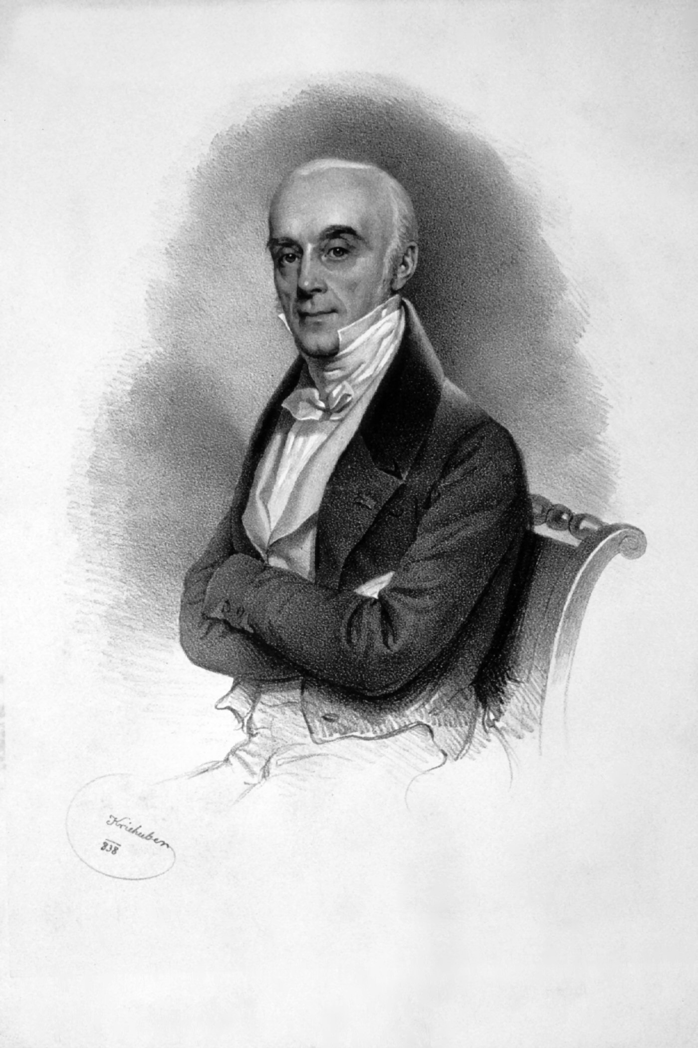 Louis de Beaupoil de Saint-Aulaire (1778-1854), französischer Staatsmann, Diplomat, Historiker, Mitglied der Académie française. Lithographie von Josef Kriehuber, 1838